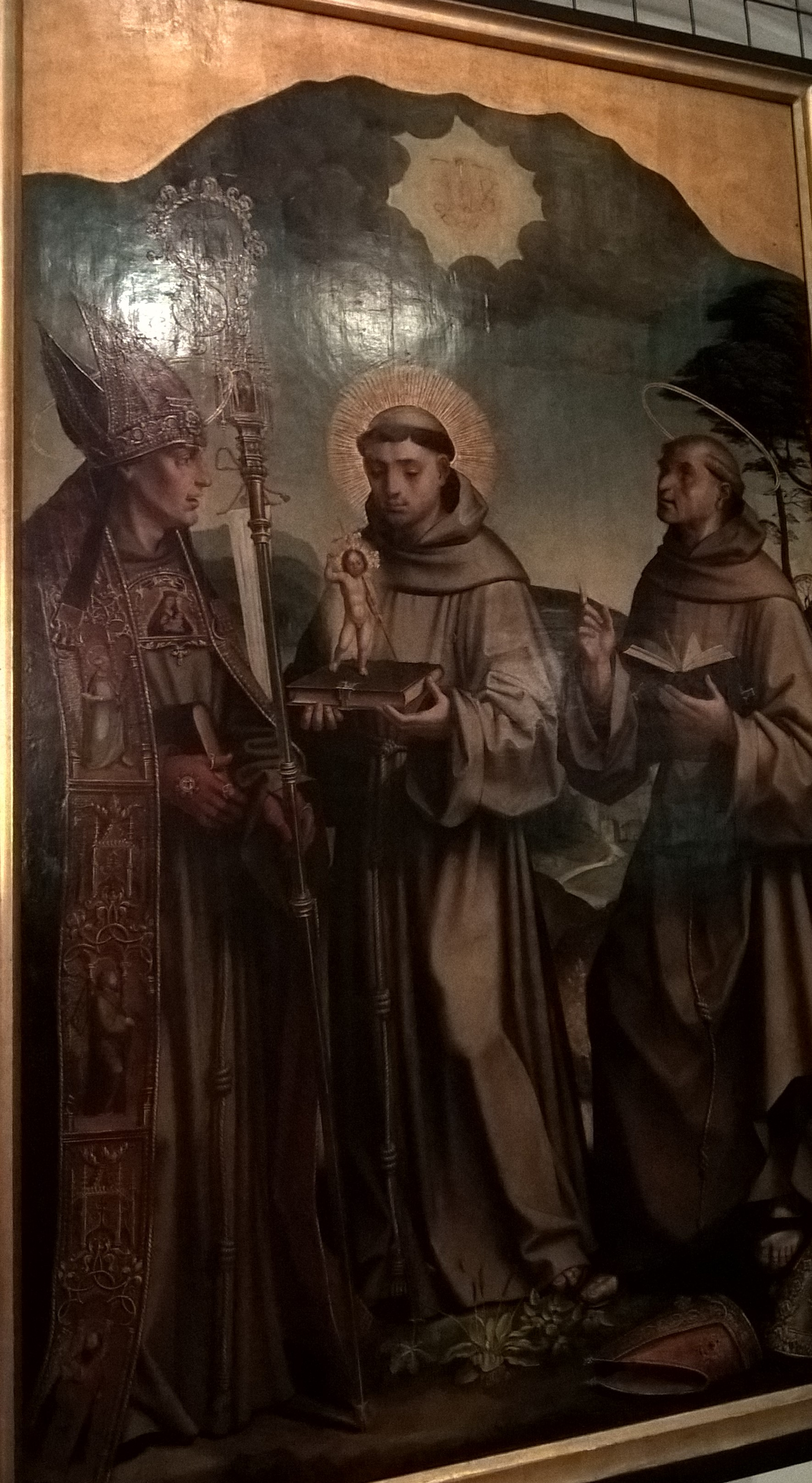 "S. Boaventura, S. António e S. Bernardino de Siena" pintura a óleo sobre madeira de 1517-1530 atribuida à oficina do Jorge Afonso e que fez parte do Retábulo Convento de Jesus.